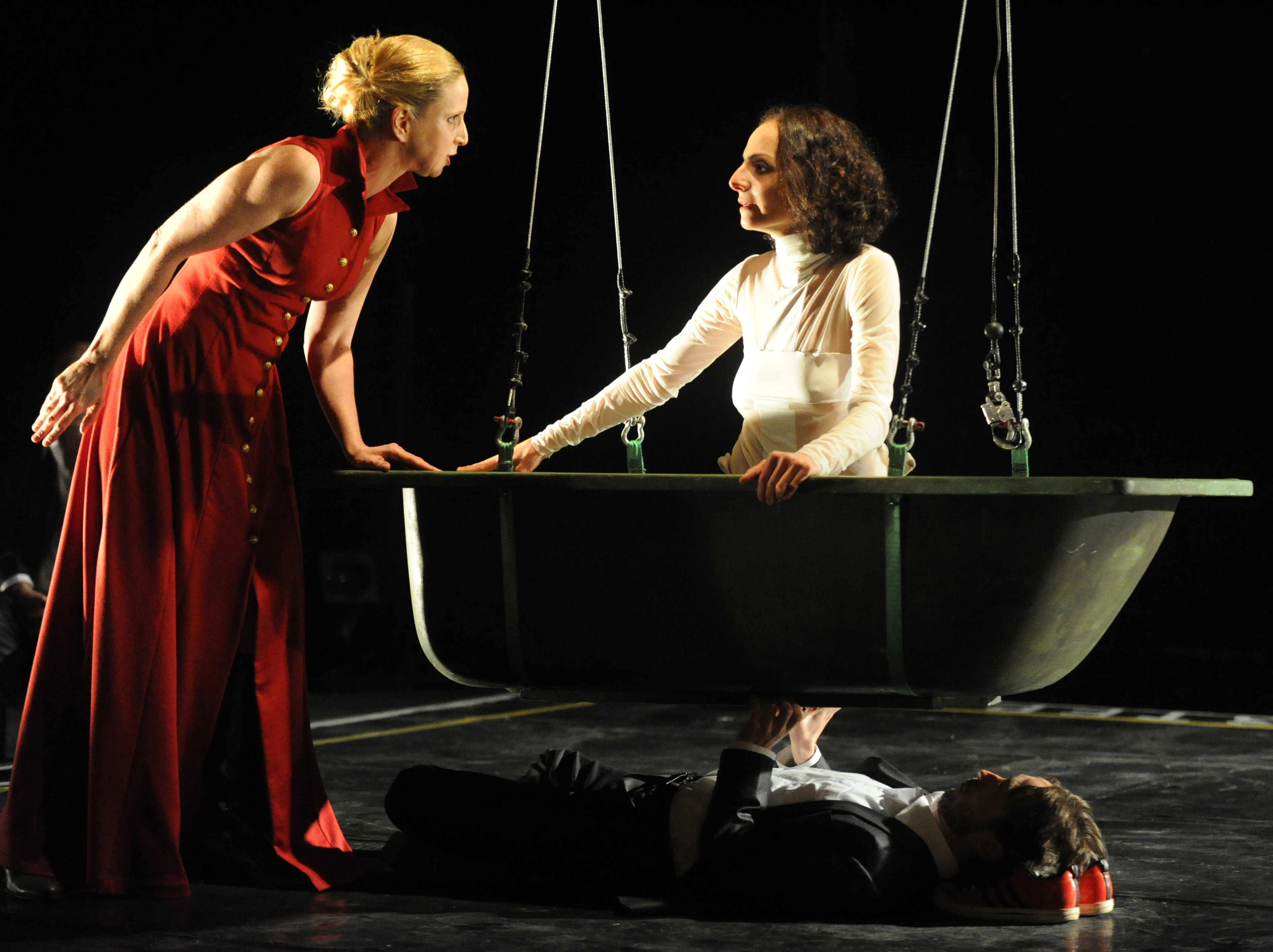 מיכל ויינברג ושירי גולן במארי סטיוארט, בבימויו של עירא אבנרי, תיאטרון תמונע, 2012